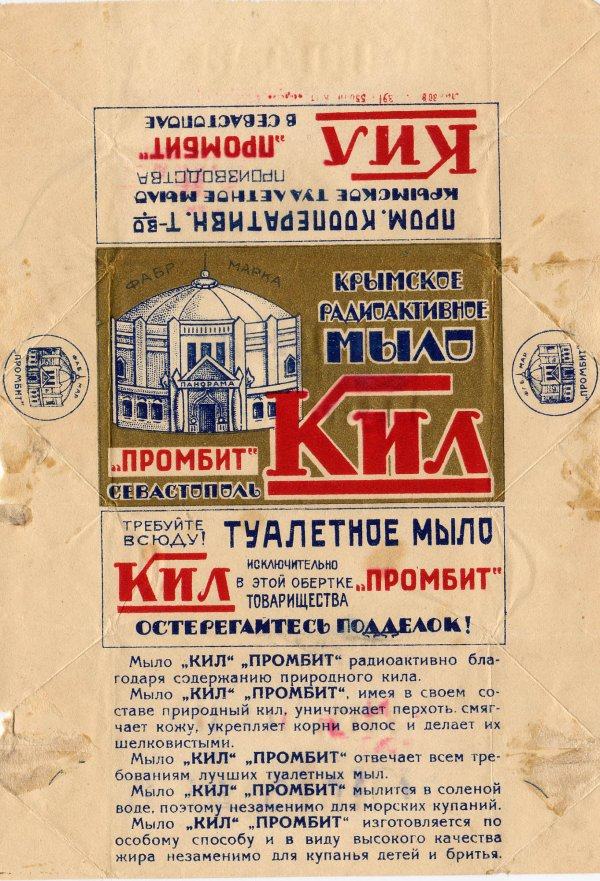 Мыло Кил. 20-е..30-е годы.